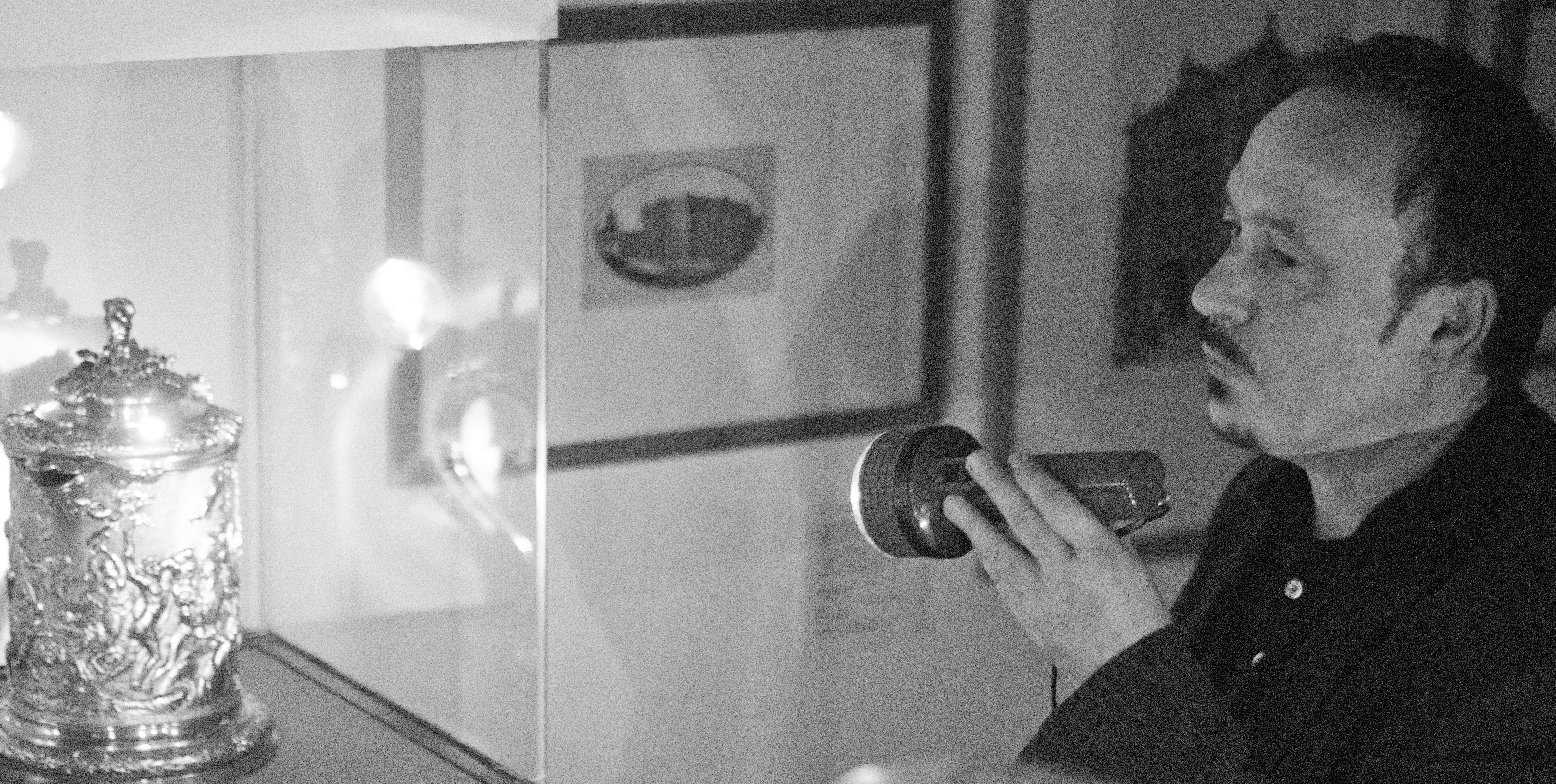 Museumsdirektor Mario Kram während einer „Taschenlampenführung“ durch die Ausstellung Waidmarkt – Drunter und Drüber im Kölnischen Stadtmuseum.